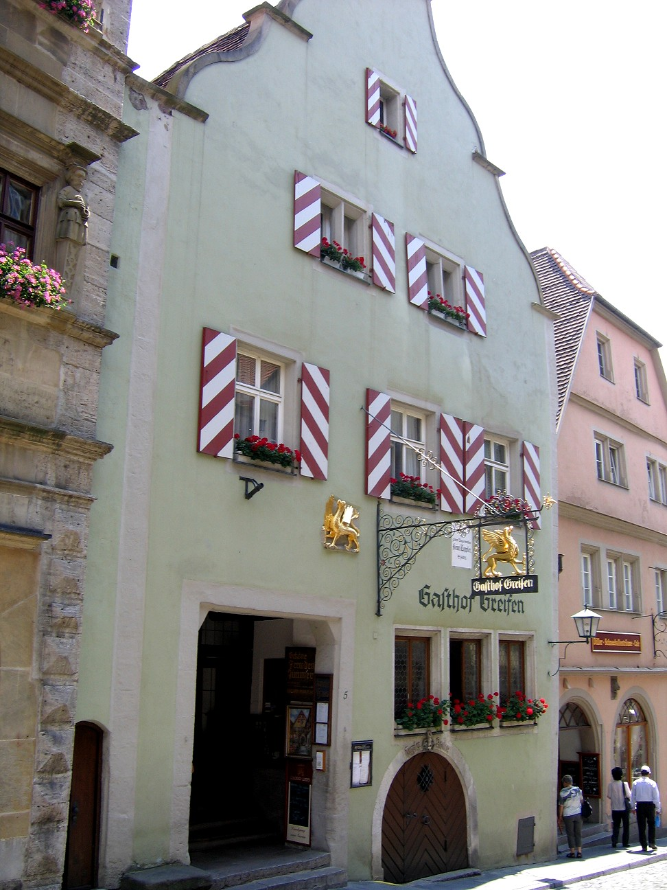 Haus zum Goldenen Greifen, Rothenburg ob der Tauber